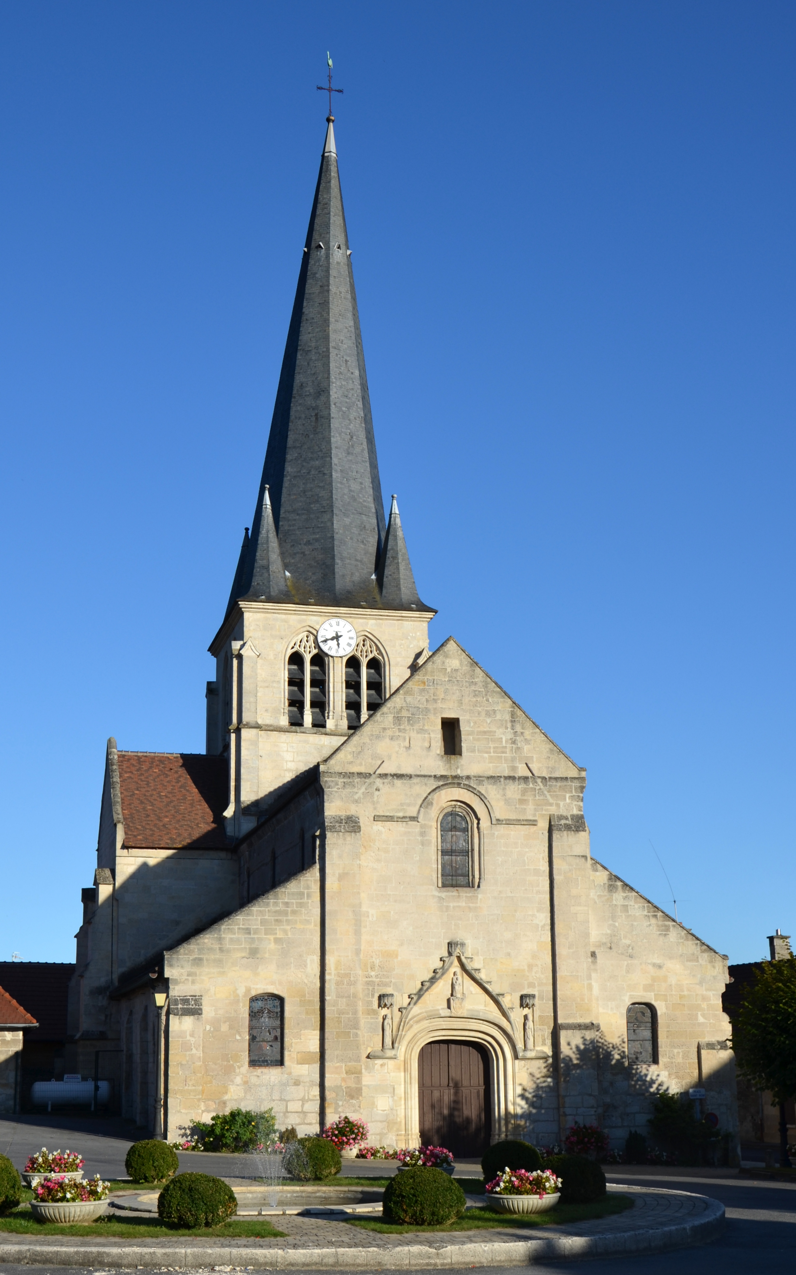 Église Saint-Rémy de Berneuil-sur-Aisne, Oise, Picardie, France .